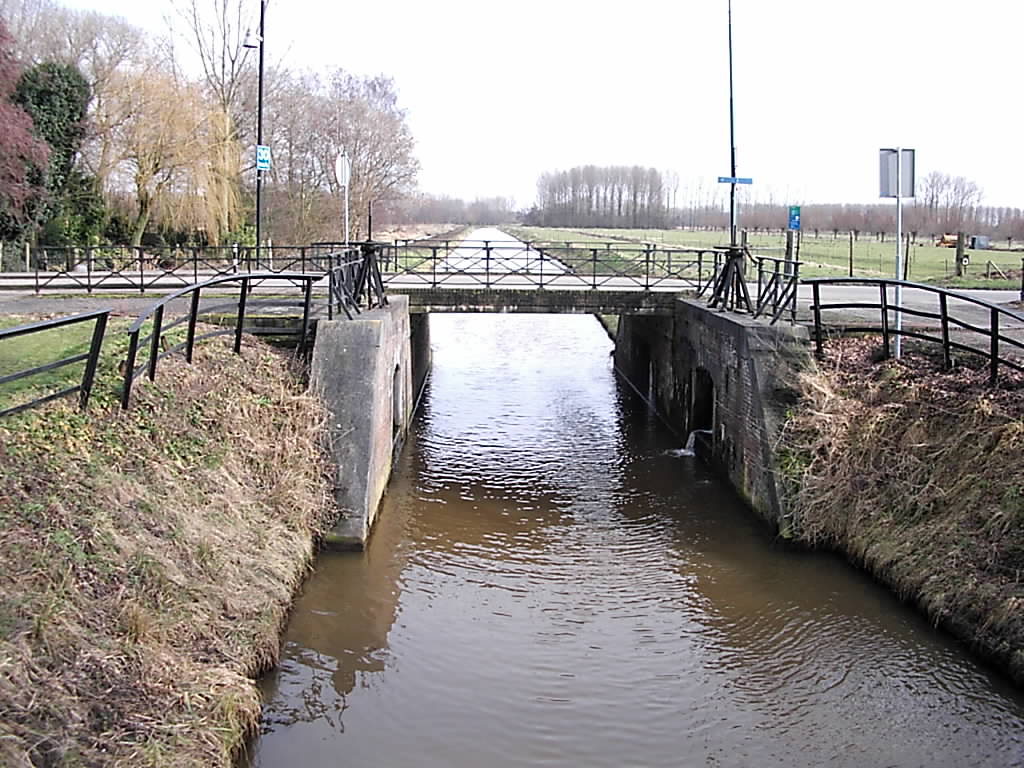 Brug over het Zuiderafwateringskanaal aan de Wendelnesseweg Oost